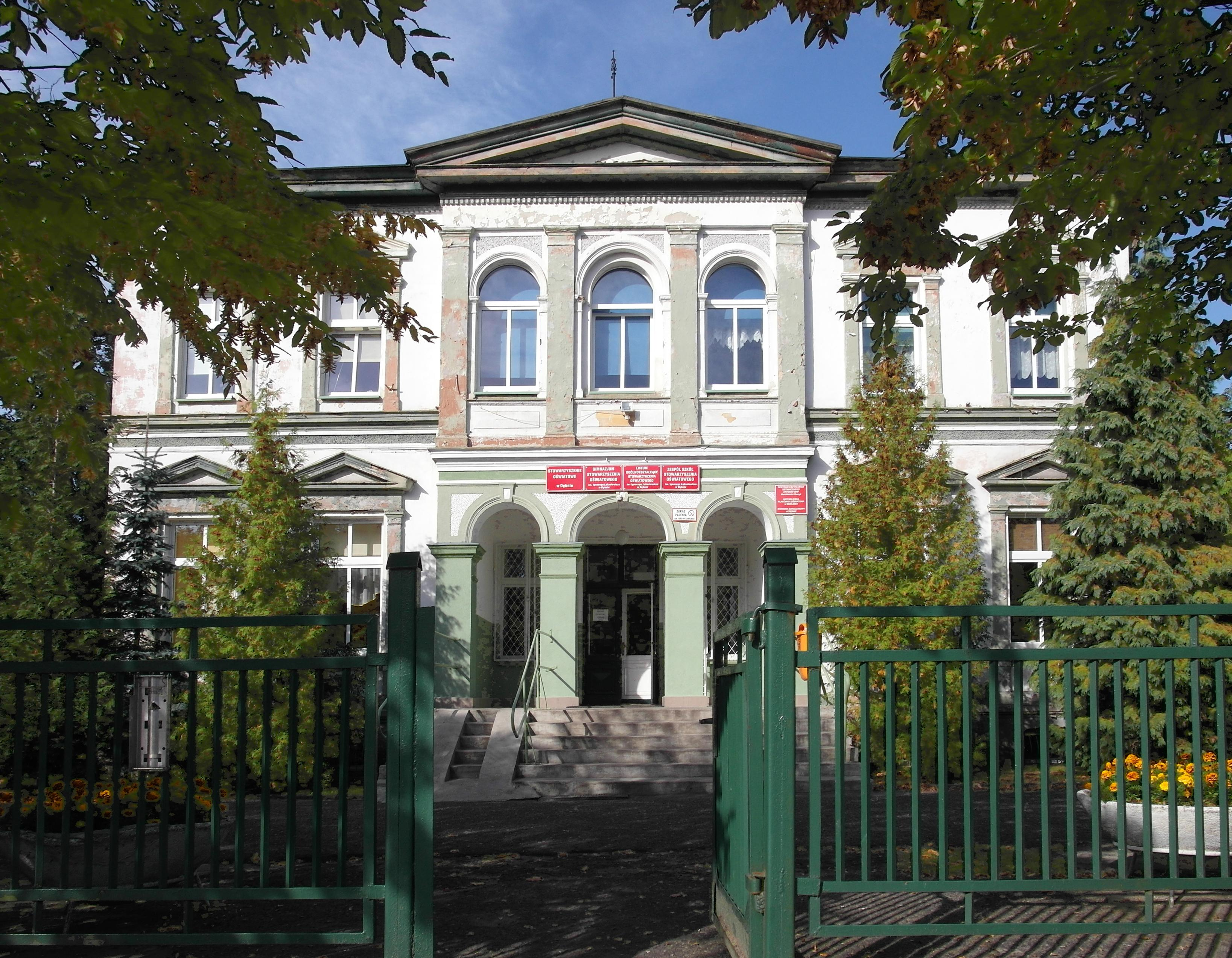 Willa /otoczenie/ ulica Baczewskiego 20, Dębno, obecnie siedziba Zespołu Szkół Stowarzyszenia Oświatowego im. Ignacego Łukasiewicza